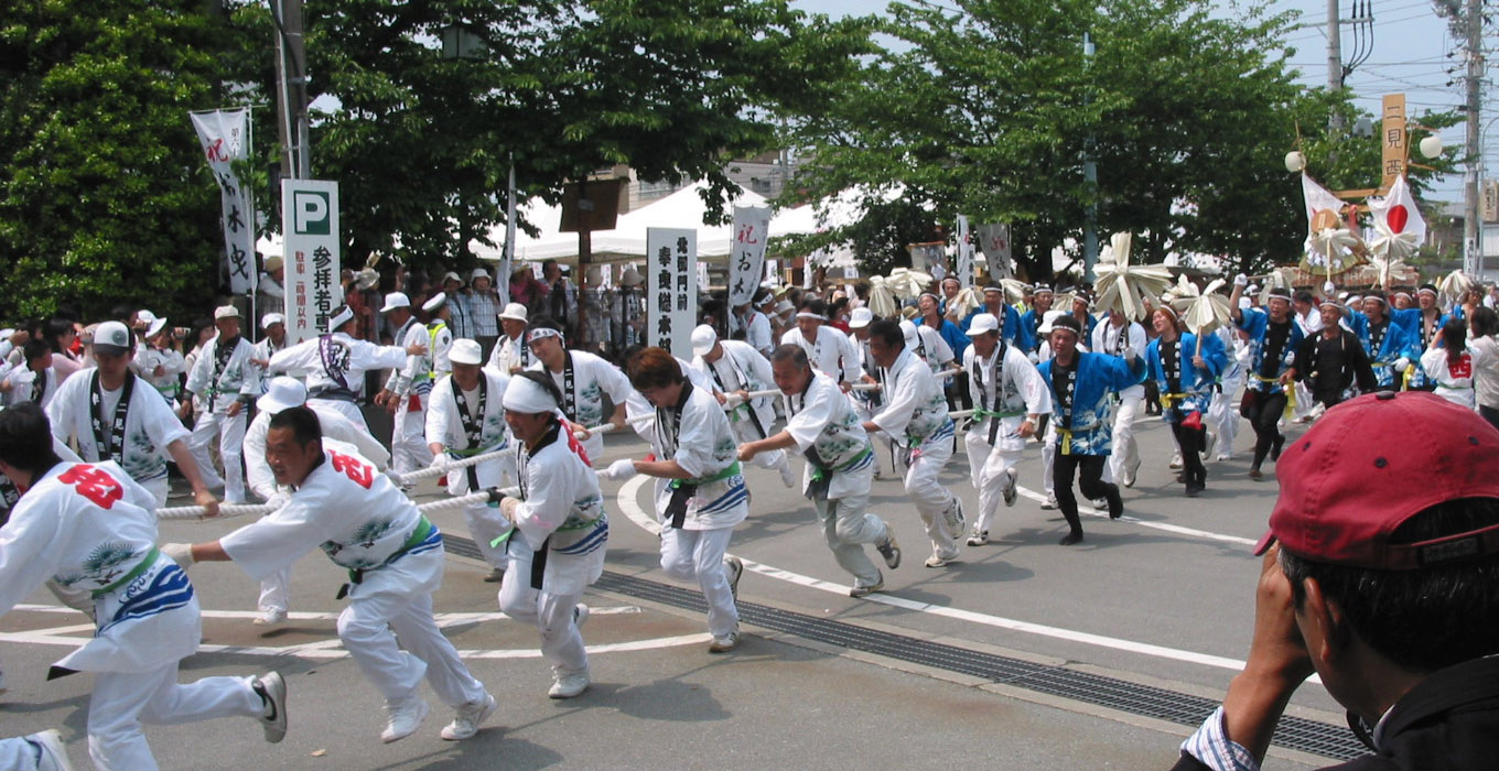 "En-yabiki" of Okihikigyoji(Okabiki) at Geku 御木曳行事（外宮領・陸曳）におけるエンヤ曳き三重県伊勢市豊川町の豊受大神宮北御門にて撮影